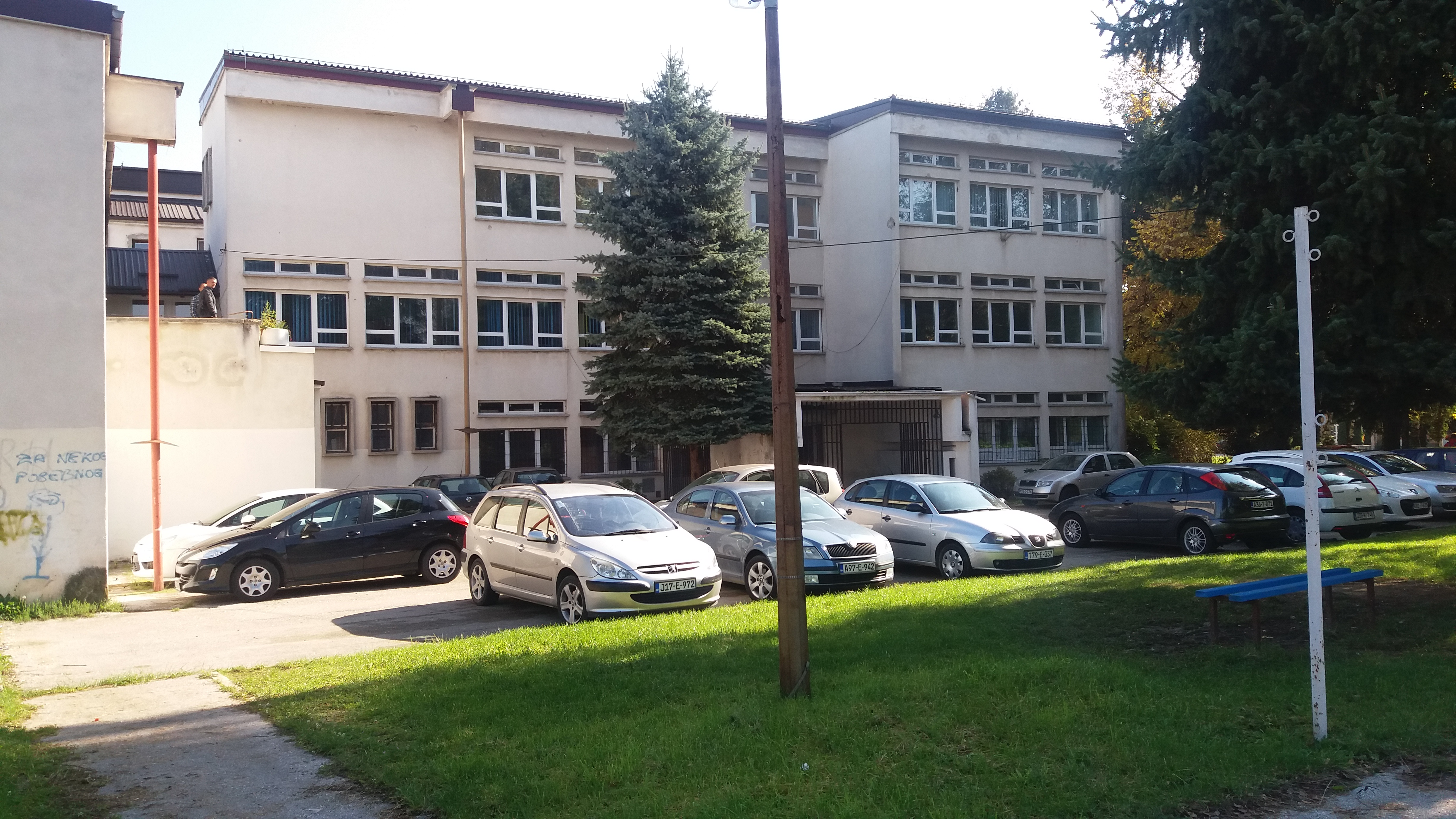 Srednja škola u Vitezu